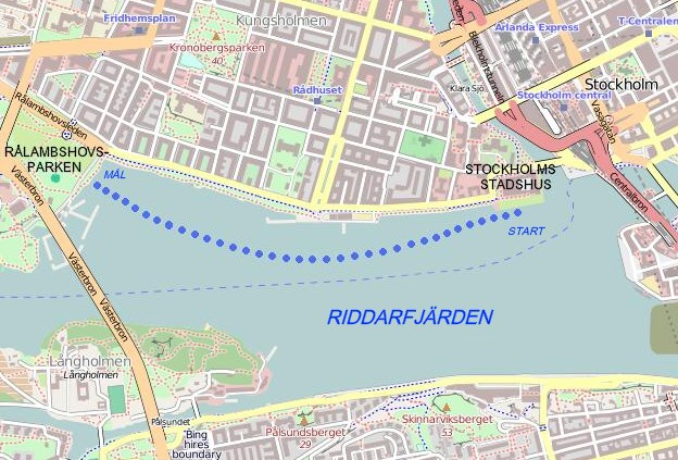 Bansträckning för Riddarfjärdssimningen i Stockholm This map may be incomplete, and may contain errors. Don't rely solely on it for navigation.